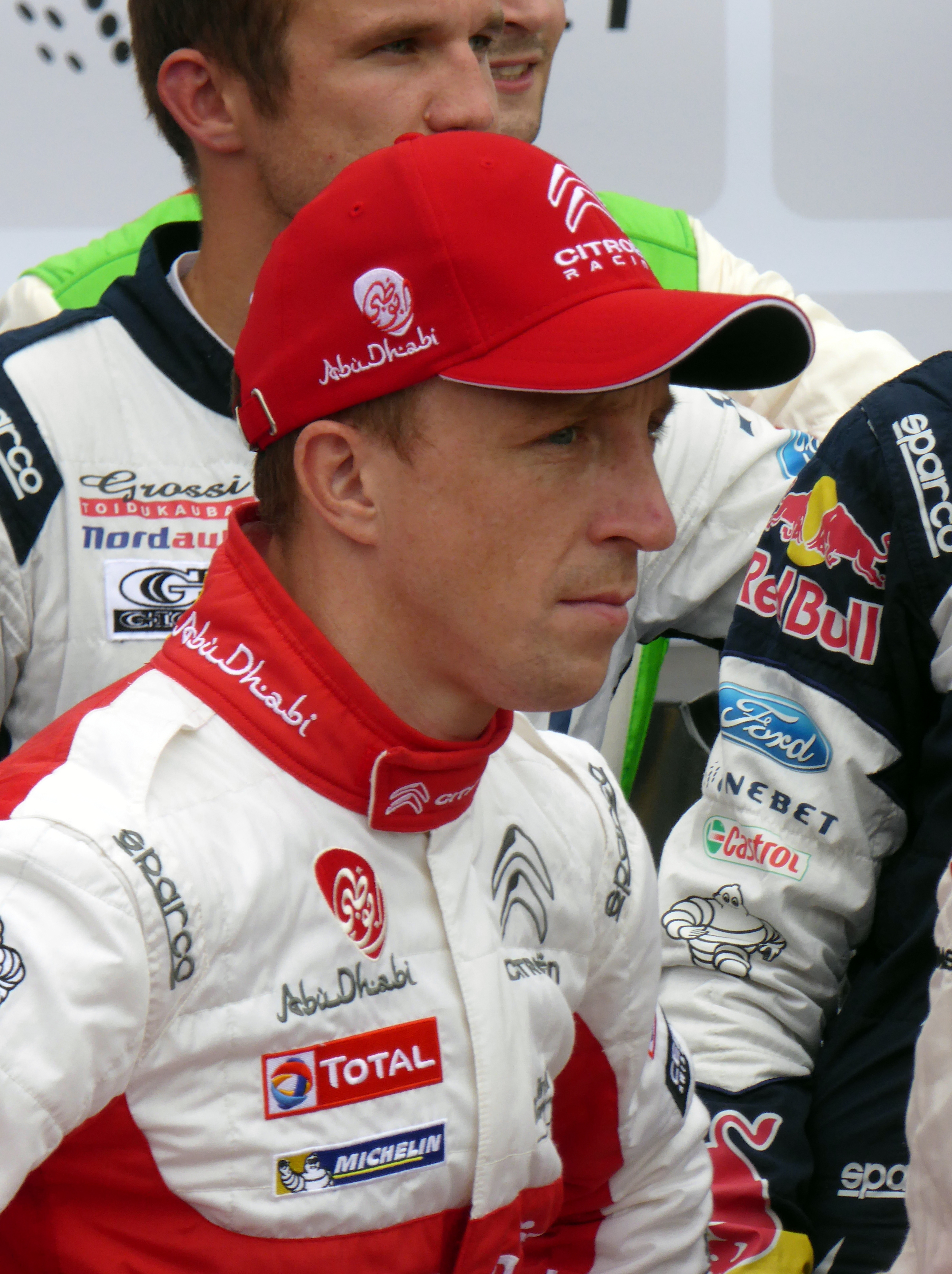 Rallye Deutschland 2017, Eröffnungszeremonie auf dem Tbilisser Platz in Saarbrücken